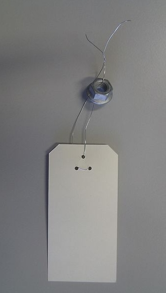 M8 Schraube mit Zink-Nickel Beschichtung an einem Manilaanhänger mit Wickeldraht.